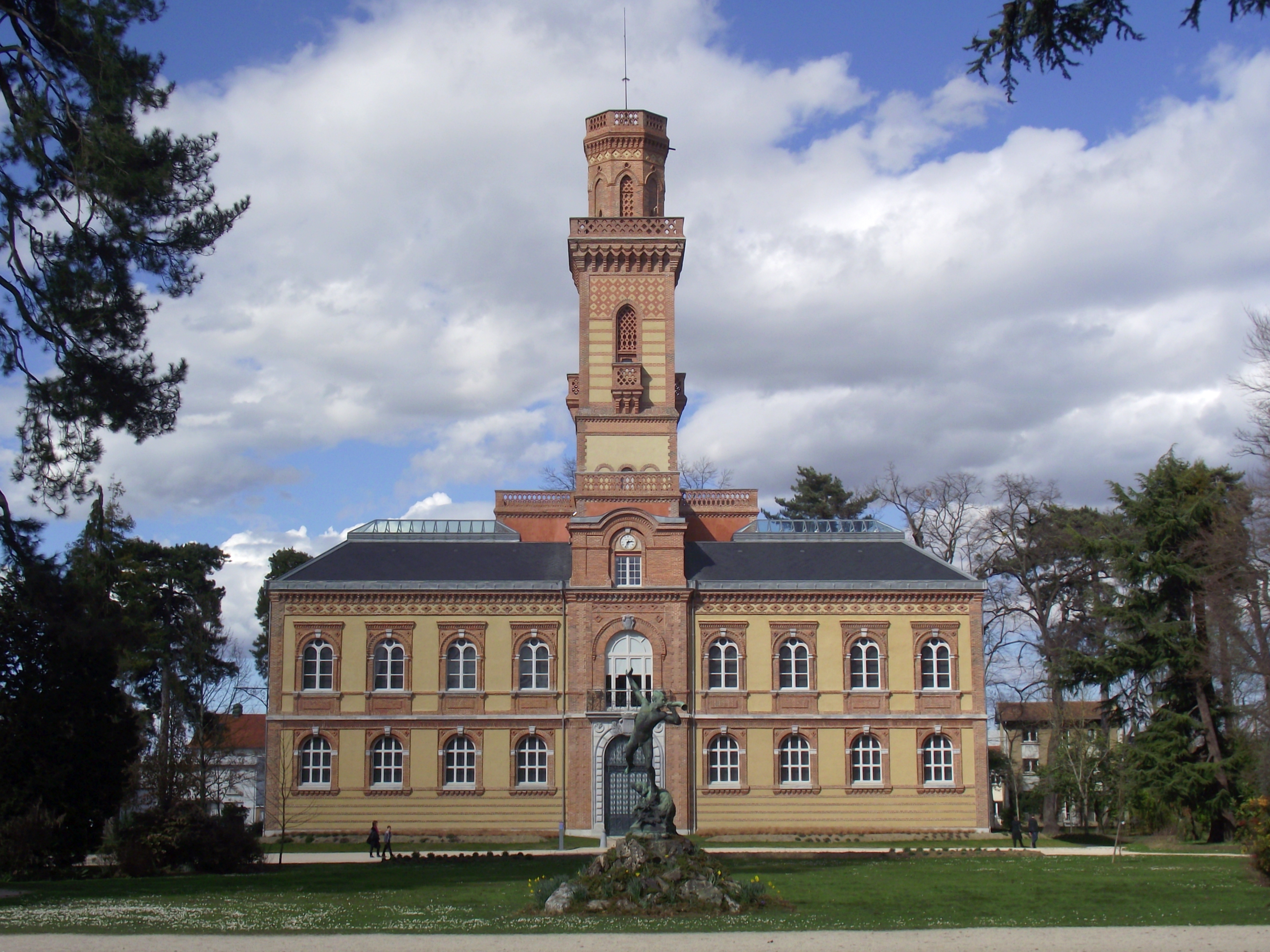 Musée Massey (Tarbes, Hautes-Pyrénées, France)